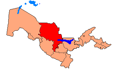 Uzbekistan - Navoiy Province